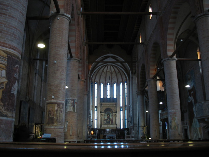 Interno della chiesa di San Nicolò a Treviso.